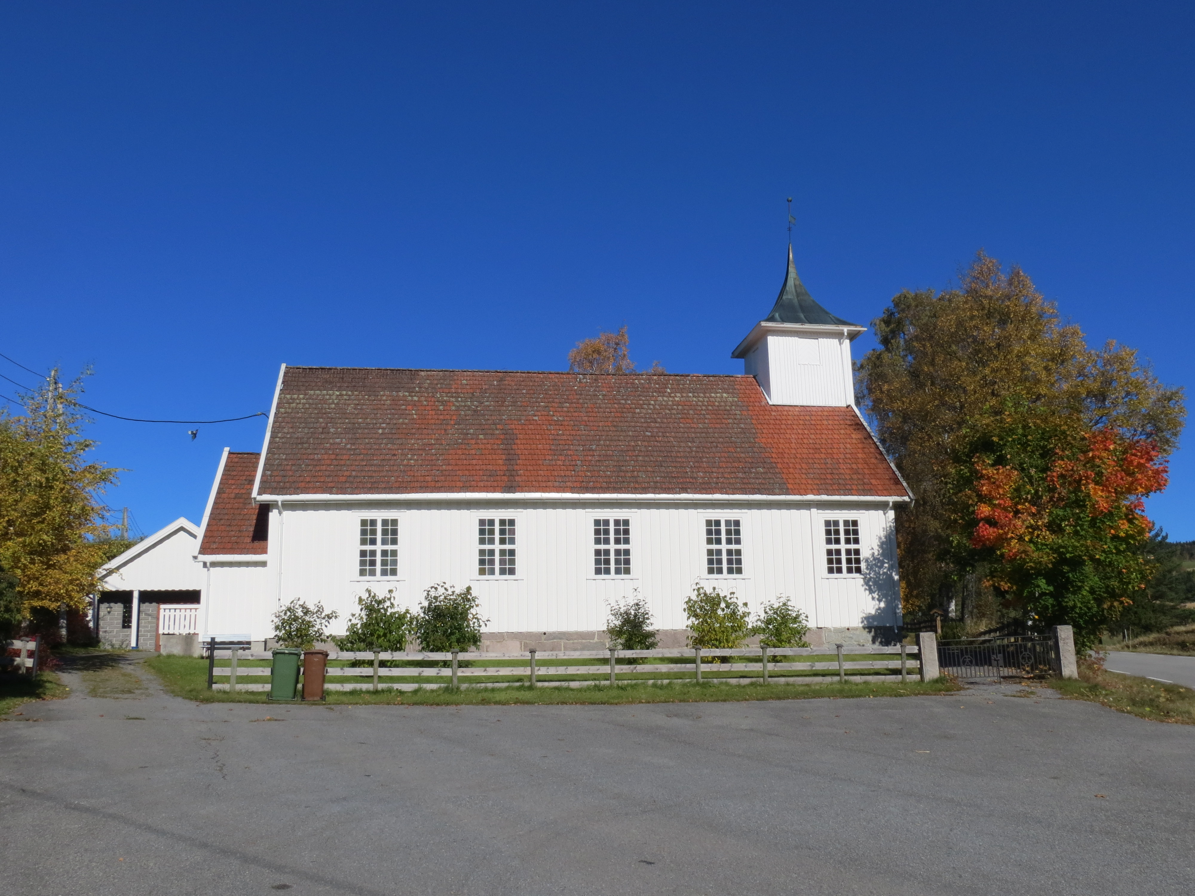 Church in the municipality of Lunner, at Hadeland (Oppland county, Norway).